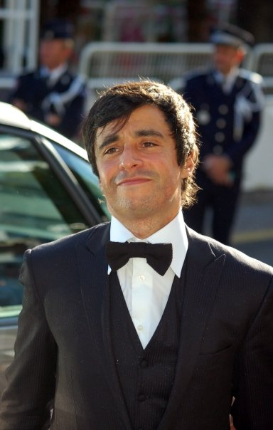 Ariel Wizman au festival de Cannes.